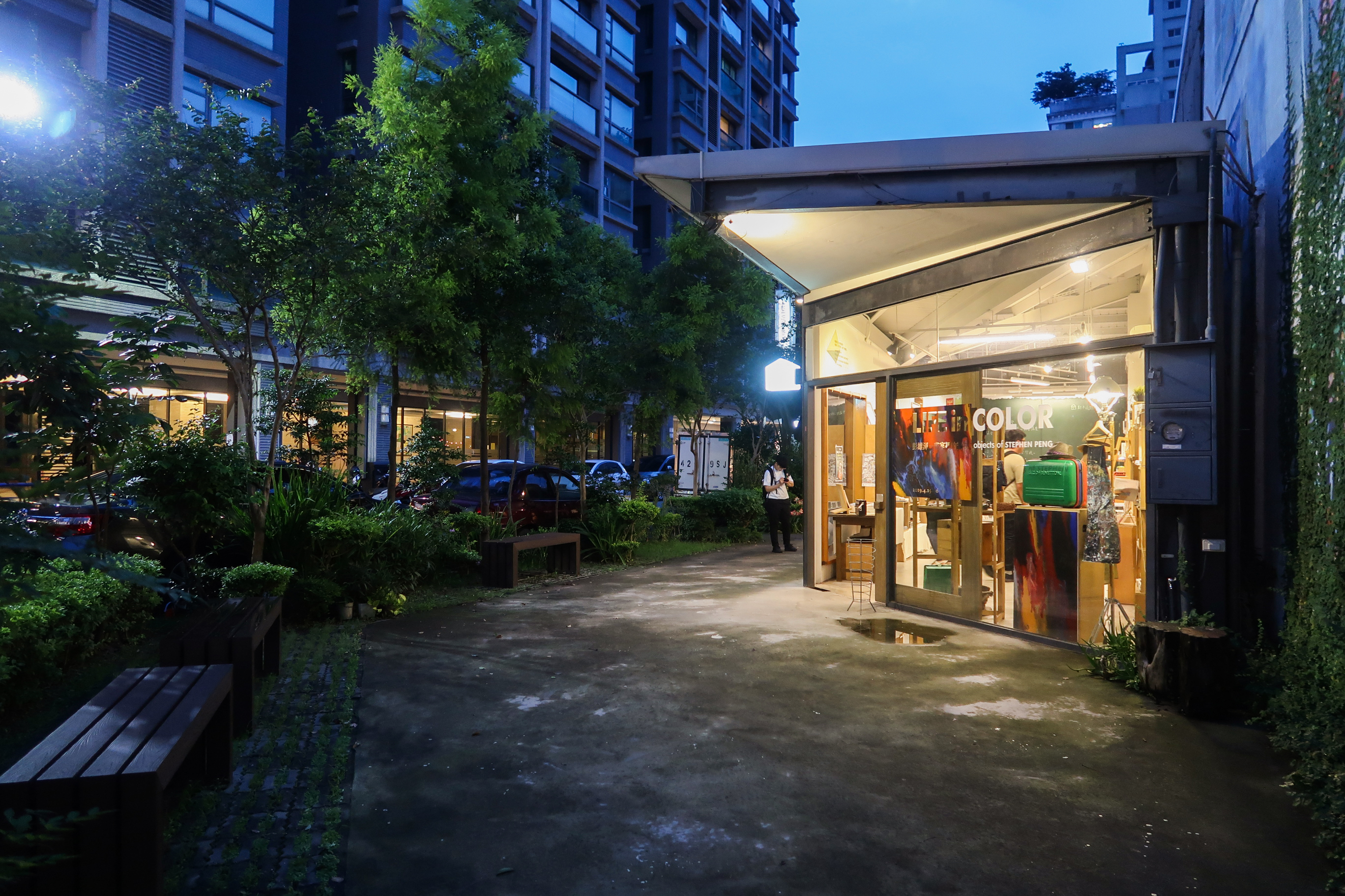 范特喜文創聚落 9號店新手書店